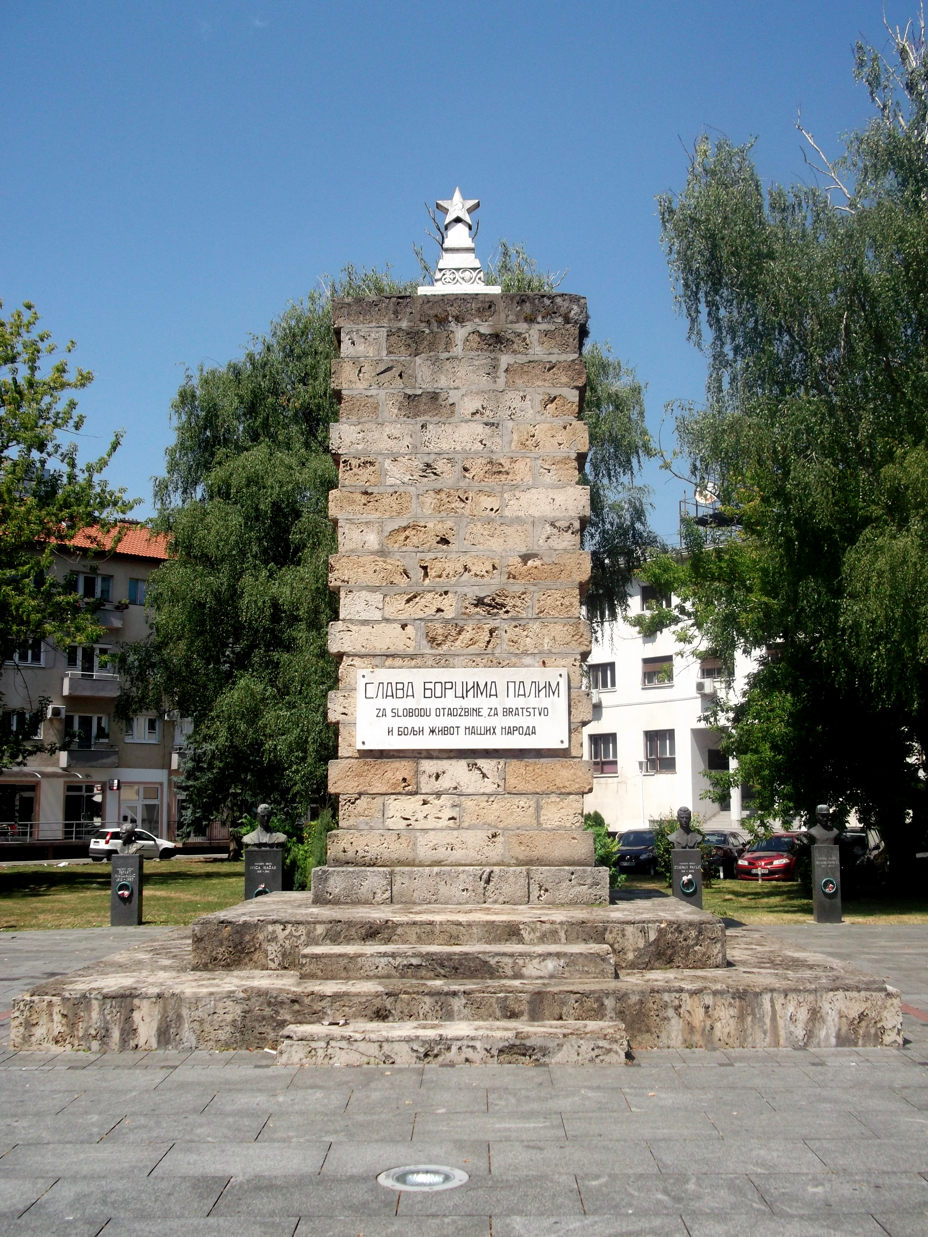 This image was uploaded as part of Trace of Soul 2015. Spomenik se nalazi u centru grada preko puta Banskog dvora, a podignut je u sećanje na poginule borce protiv fašizma u II svetskom ratu. Oko spomenika postavljene su biste narodnih heroja. Zanimljiv je natpis na spomeniku pisan na ćirilici i latinici: Slava borcima palim za slobodu otadžbine, za bratstvo i bolji život naših naroda.